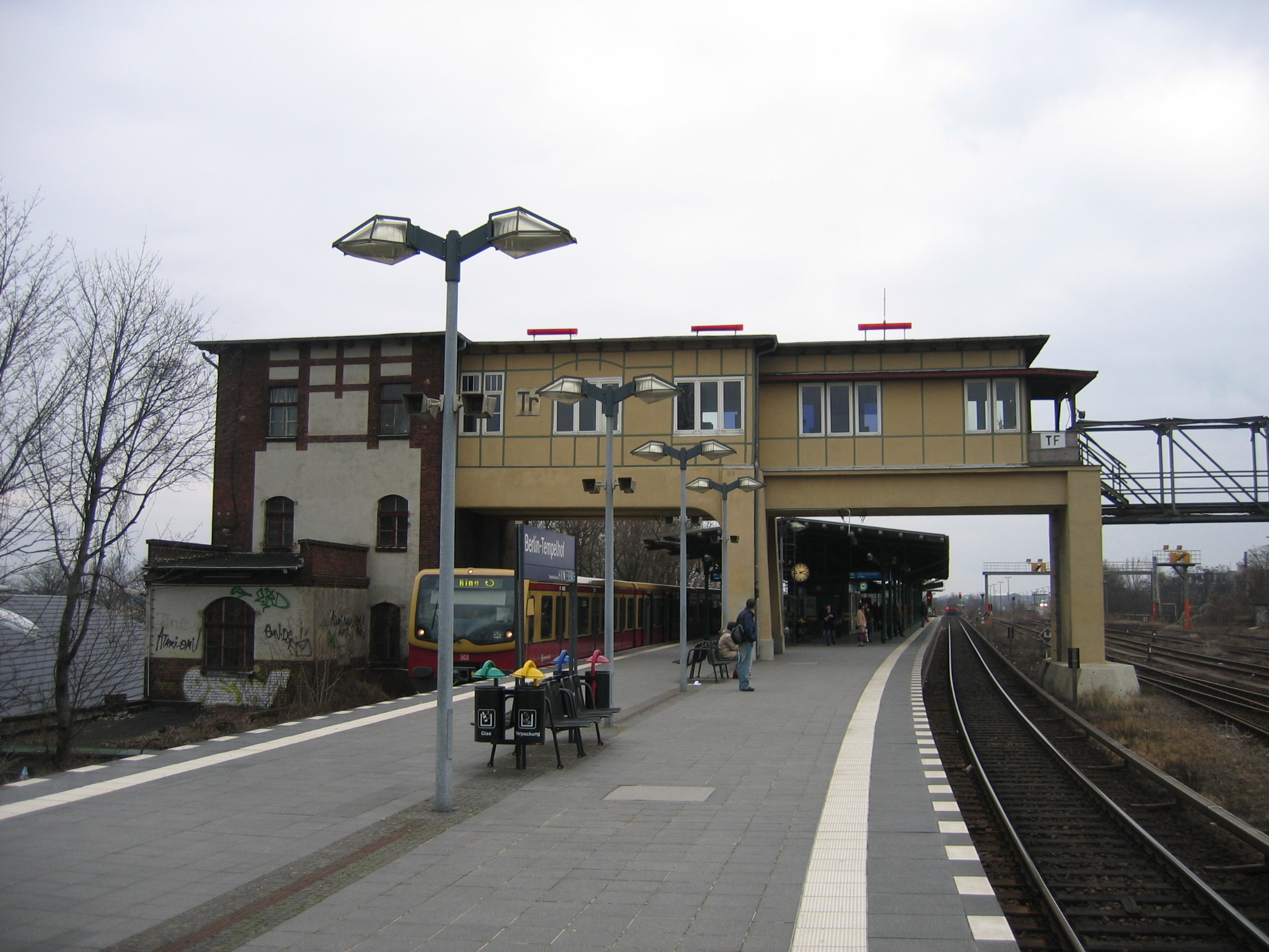 S-Bahnsteige des Bahnhofs Tempelhof in Berlin